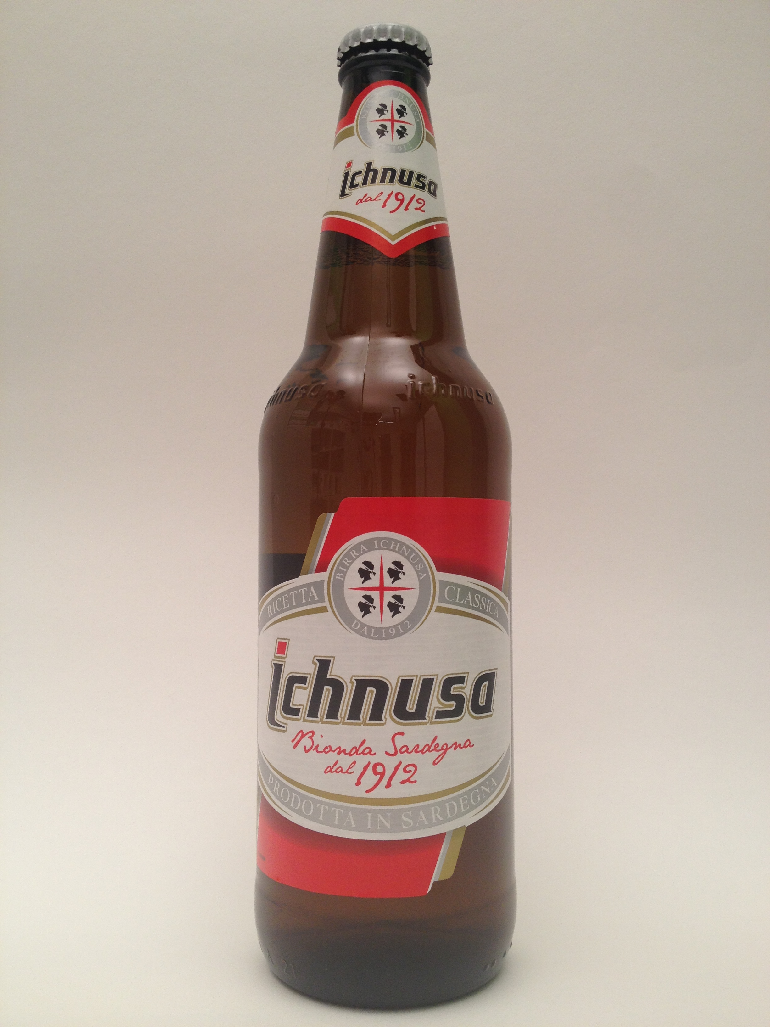 Bottiglia di Birra Ichnusa